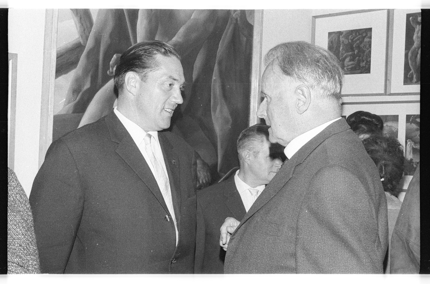 Johann Kluska und Heinz Schmidt in der Vernissage der Galerie Das Bild vom September 1965. Henschel-Fotobestand Fotograf: Jürgen Henschel (1923-2012) Ort: Wilmersdorfer Straße 72 (Berlin-Charlottenburg) Jahr 1965 Rechte für nicht-kommerzielle Nutzung freigegeben FHXB Friedrichshain-Kreuzberg Museum CC-BY-NC-SA @ FHXB Friedrichshain-Kreuzberg Museum